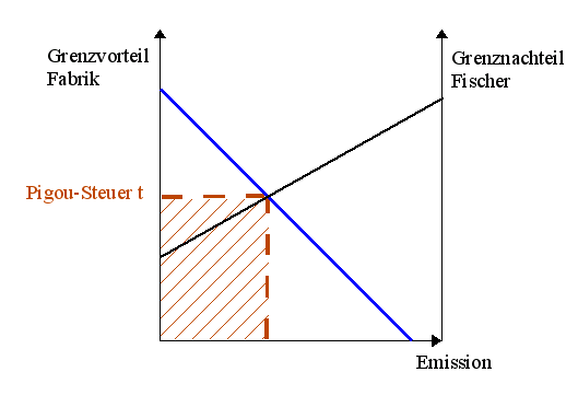 schematische Darstellung, wie durch eine Steuer die Emission gesenkt werden kann